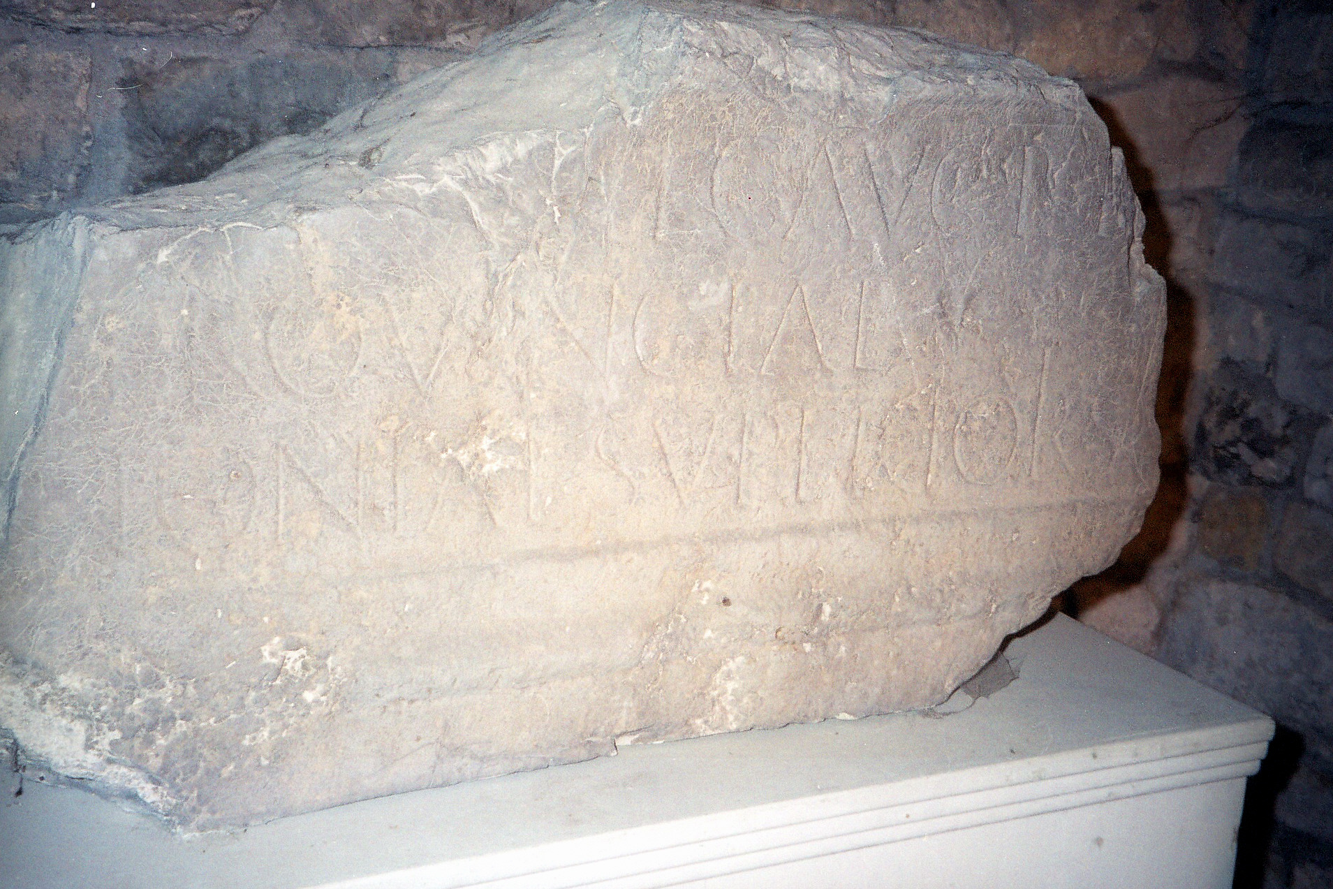 Fragment d'inscription latine d'époque romaine retrouvée en Ardèche (France) à Joyeuse - La Blachère, lieu dit Drôme-Laveyrune (Gaule Narbonnaise, ager Helviorum), photographié dans la mairie d'Aubenas. Les autres fragments de l'inscription ont été perdus, ils avaient été vus avant le XXème siècle. Il s'agit de l'épitaphe de M. Iallius Bassus, sénateur romain de l'époque de Marc Aurèle. Le texte latin complet était : "M(arco) Iallio M(arci) f(ilio) Volt(inia) Basso Fabio Valeriano, co(n)s(uli), prae[tori, leg(ato) leg(ionis) X Geminae ?], leg(ato) Aug(usti) pr(o) pr(aetore) / provinc(iae) Pannoniae inferioris, curatori op[e]r(um) [p]u[bl(icorum), leg(ato) Augg(ustorum) pr(o) pr(aetore)] provinciae / Mysiae inferior(is), comiti Augustorum Par[th]i[c]a[e] [e]xp[ed(itionis), leg(ato) Augg(ustorum) pr(o) pr(aetore) provinc(iae) Pan]noniae superioris, […". Références : CIL XII, 2718 + 2719 (le fragment photographié a été publié comme CIL XII, 2719, il figure en gras dans le texte latin) ; complétée par le fragment Brühl, Gallia, 18, 1960, pp. 375-376 (AE 1961, n° 171) ; A Blanc et H. Desaye, ”Inscriptions nouvelles de la Drôme et de l’Ardèche”, Gallia, 33, 1975, pp. 241-244 (AE 1976, n° 416) ; J. Dupraz, C. Fraisse, B. Rémy, Carte Archéologique de la Gaule 07 : l’Ardèche, Paris, 2001, p. 266-267 (fig. 316-317) ]